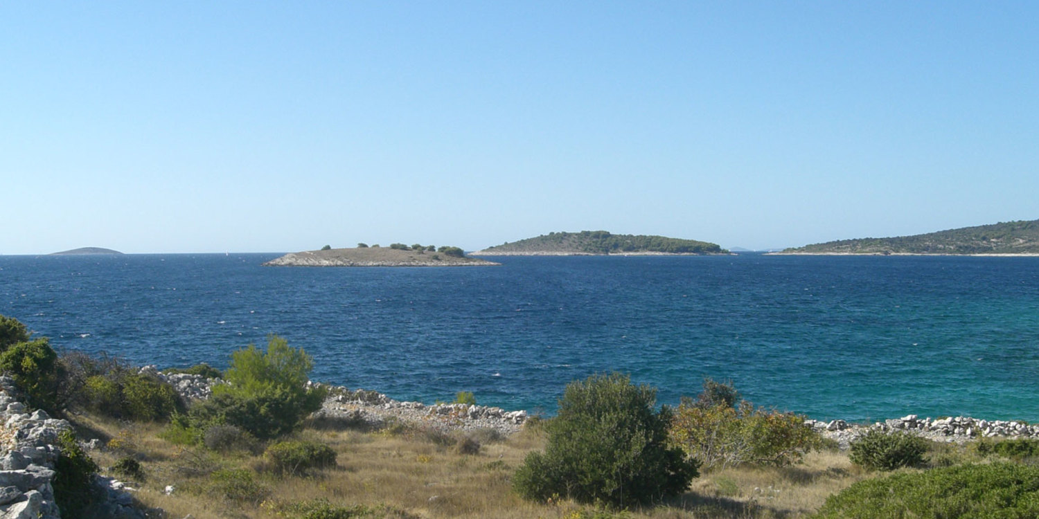 island of Svilan, Lukvenjak, Jaz, near Rogoznica, Croatia